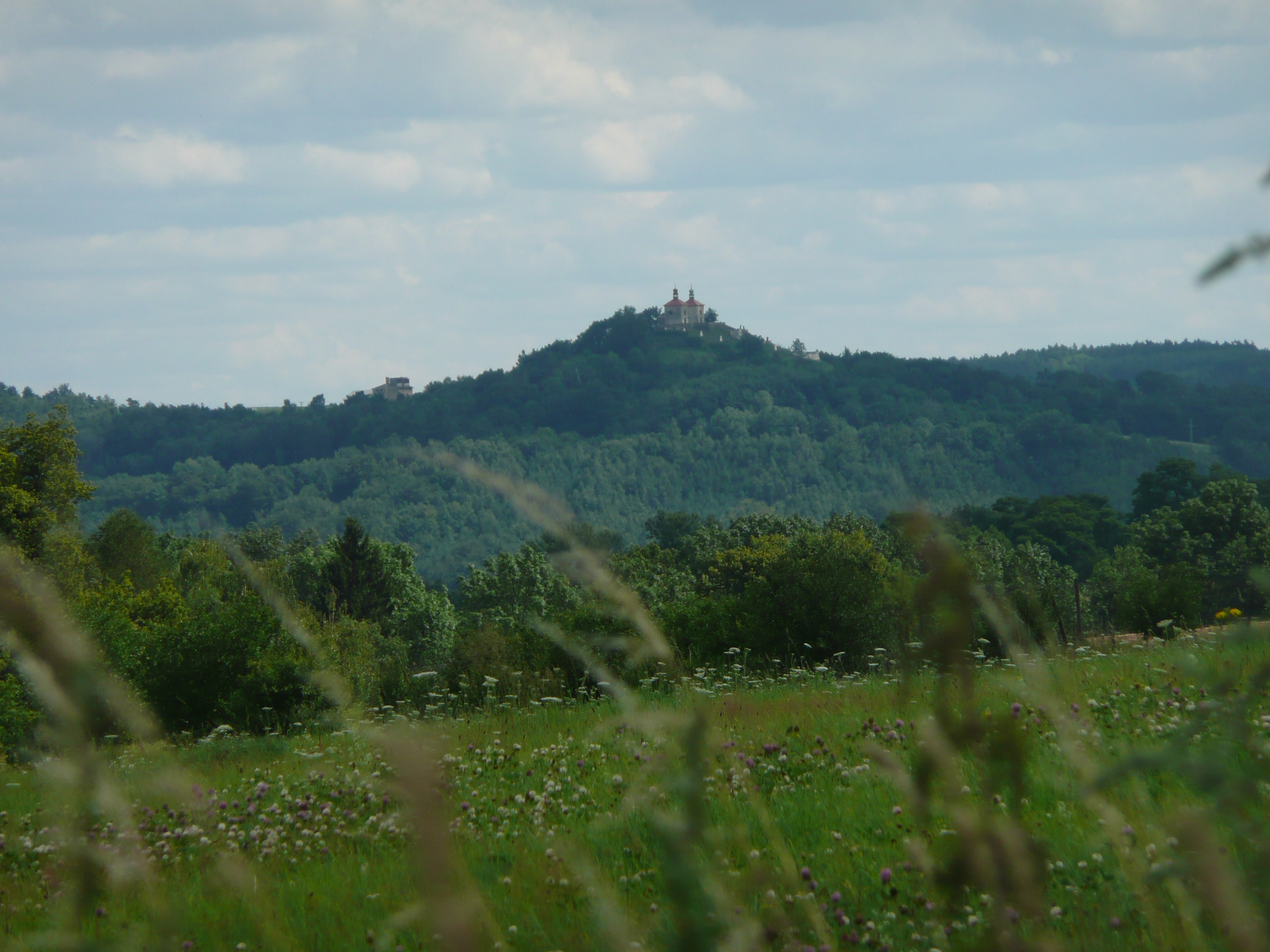 Blick auf den Kapellenberg von Konojedy aus